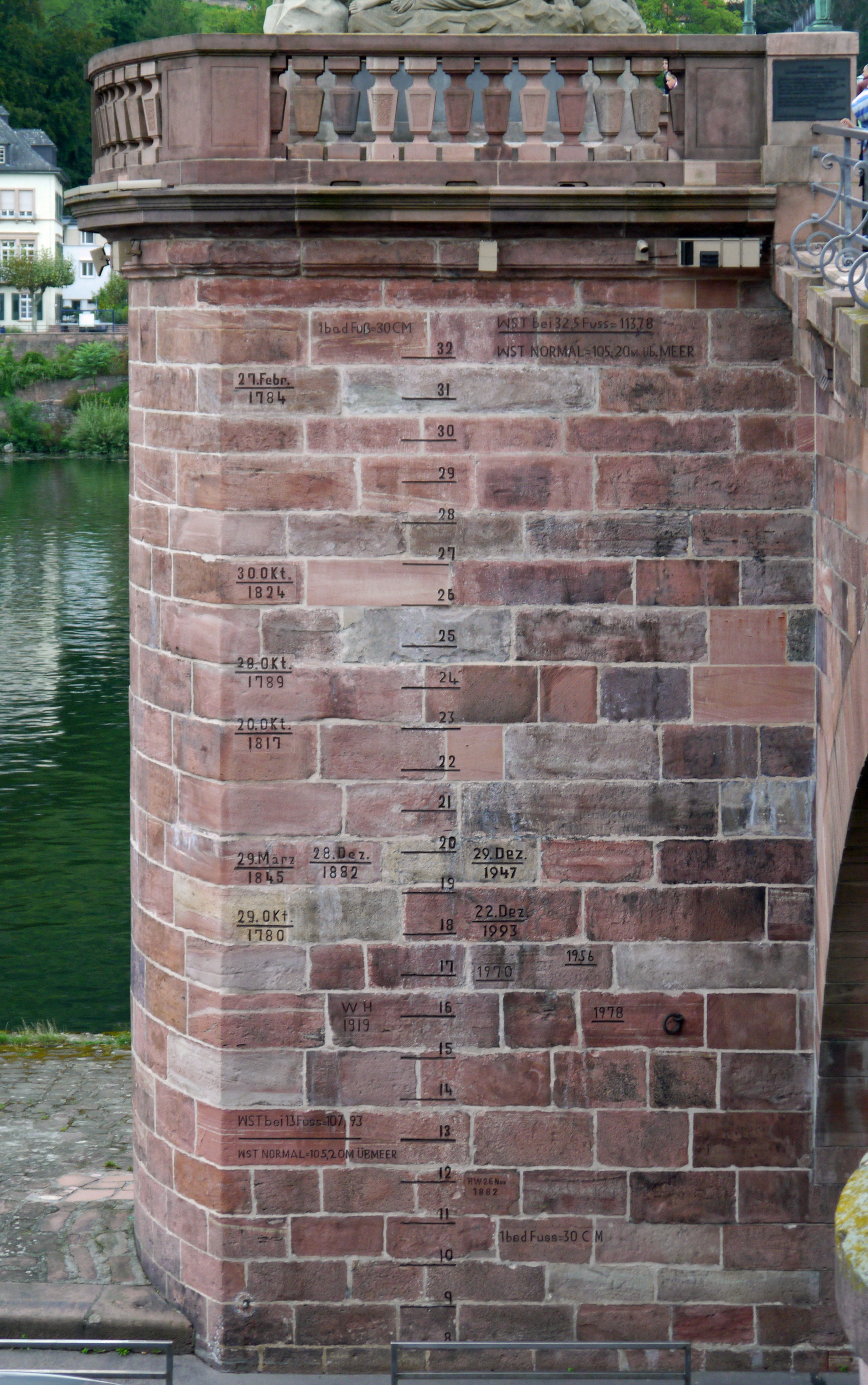 Die Alte Brücke in Heidelberg. 2012 die Hochwassermarken an der Süd-West-Seite..